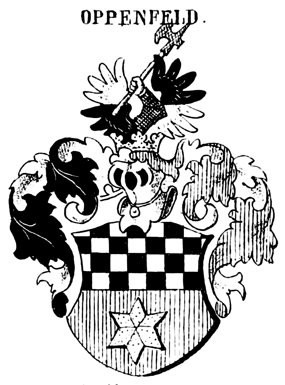 Stammwappen derer von Oppenfeld